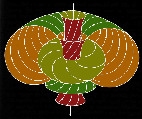 Twistor